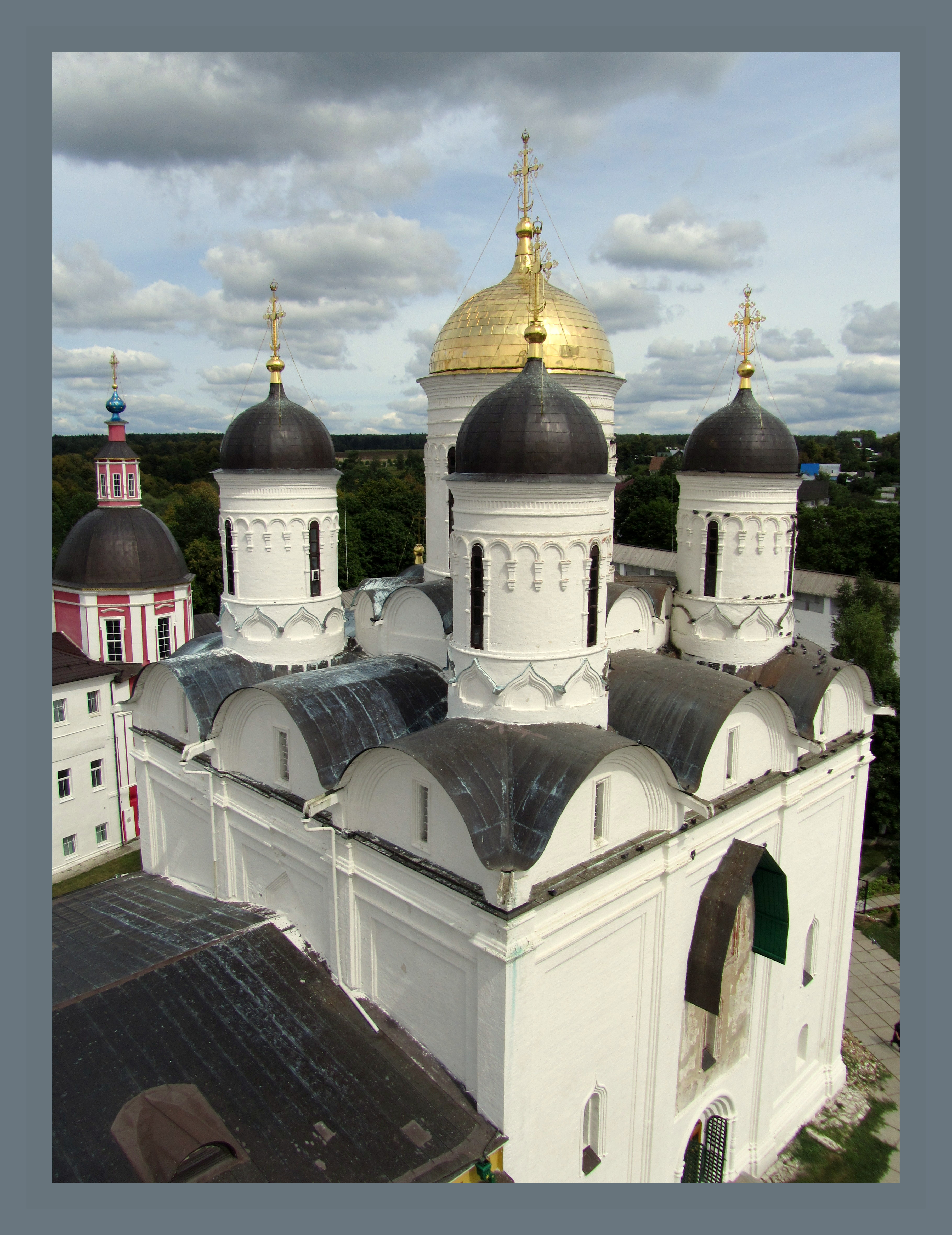 Собор Рождества Пресвятой Богородицы: в составе МО ГП Боровск, Боровский, Калужская область